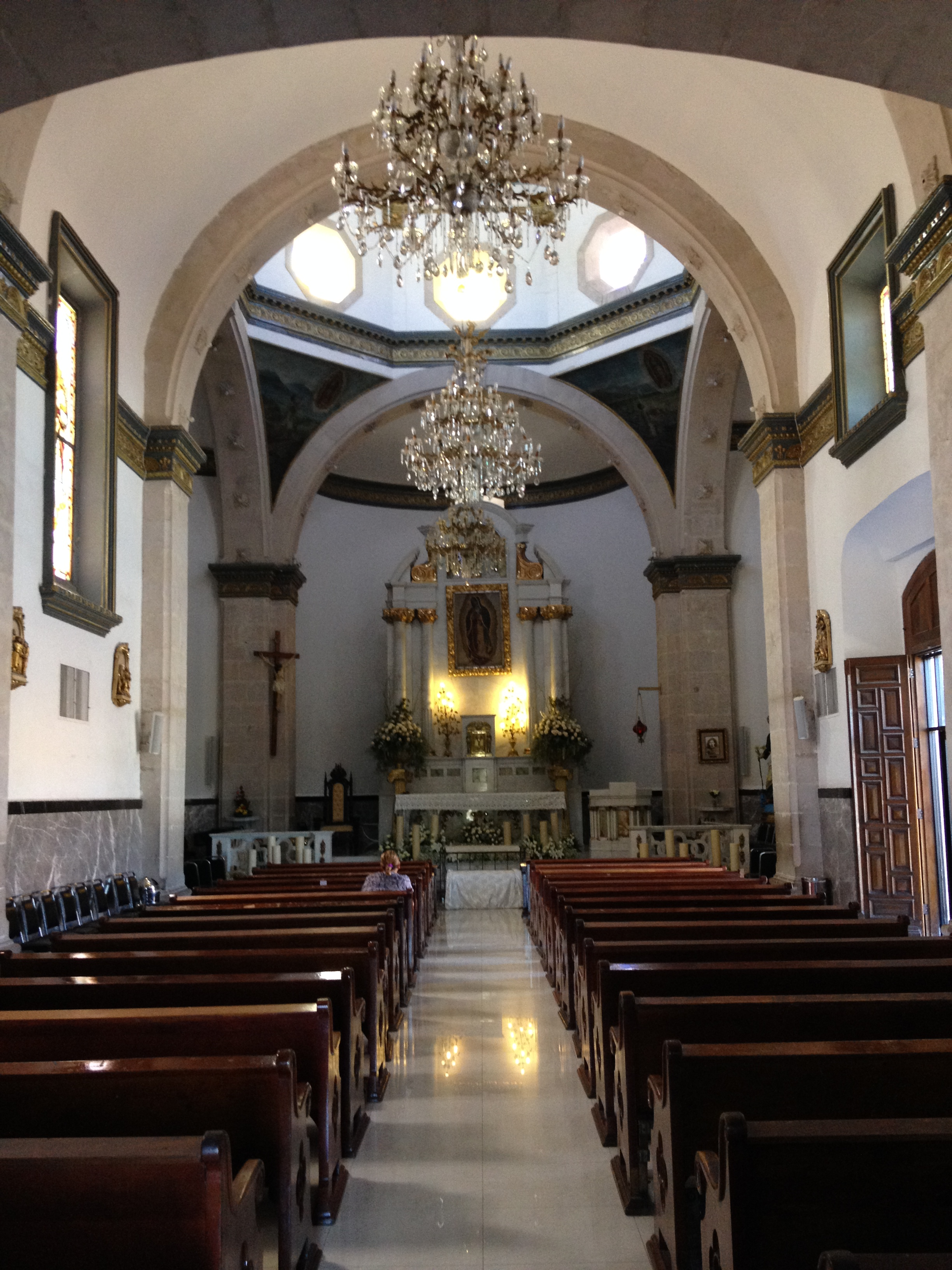 Interior del Santuario de Guadalupe en Chihuahua, Chih.